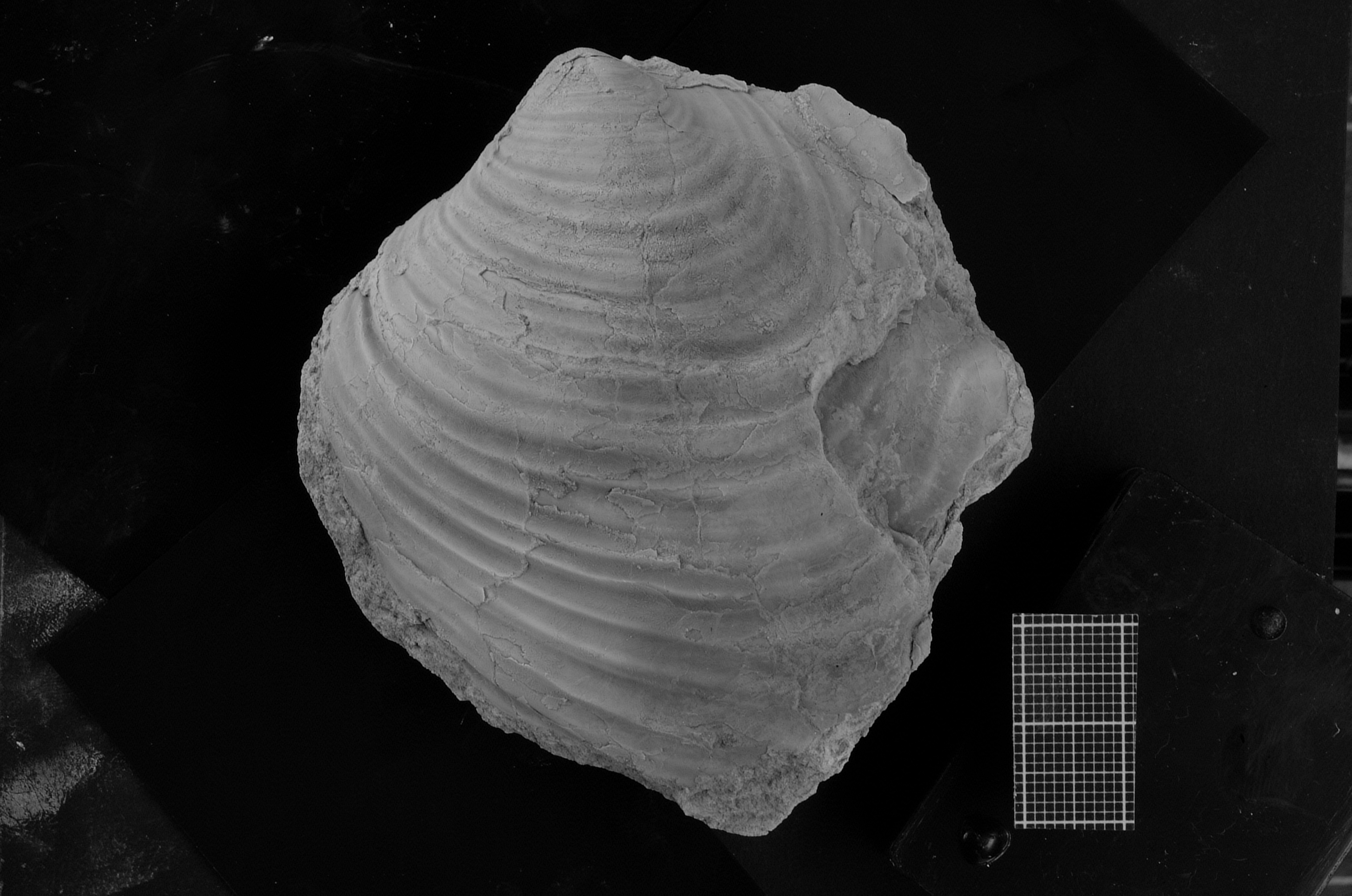 Valva izquierda del bivalvo cretácico Inoceramus curacoensis, de la Formación Agrio, Patagonia Argentina. La preservación no alcanza para confirmar la identificación.